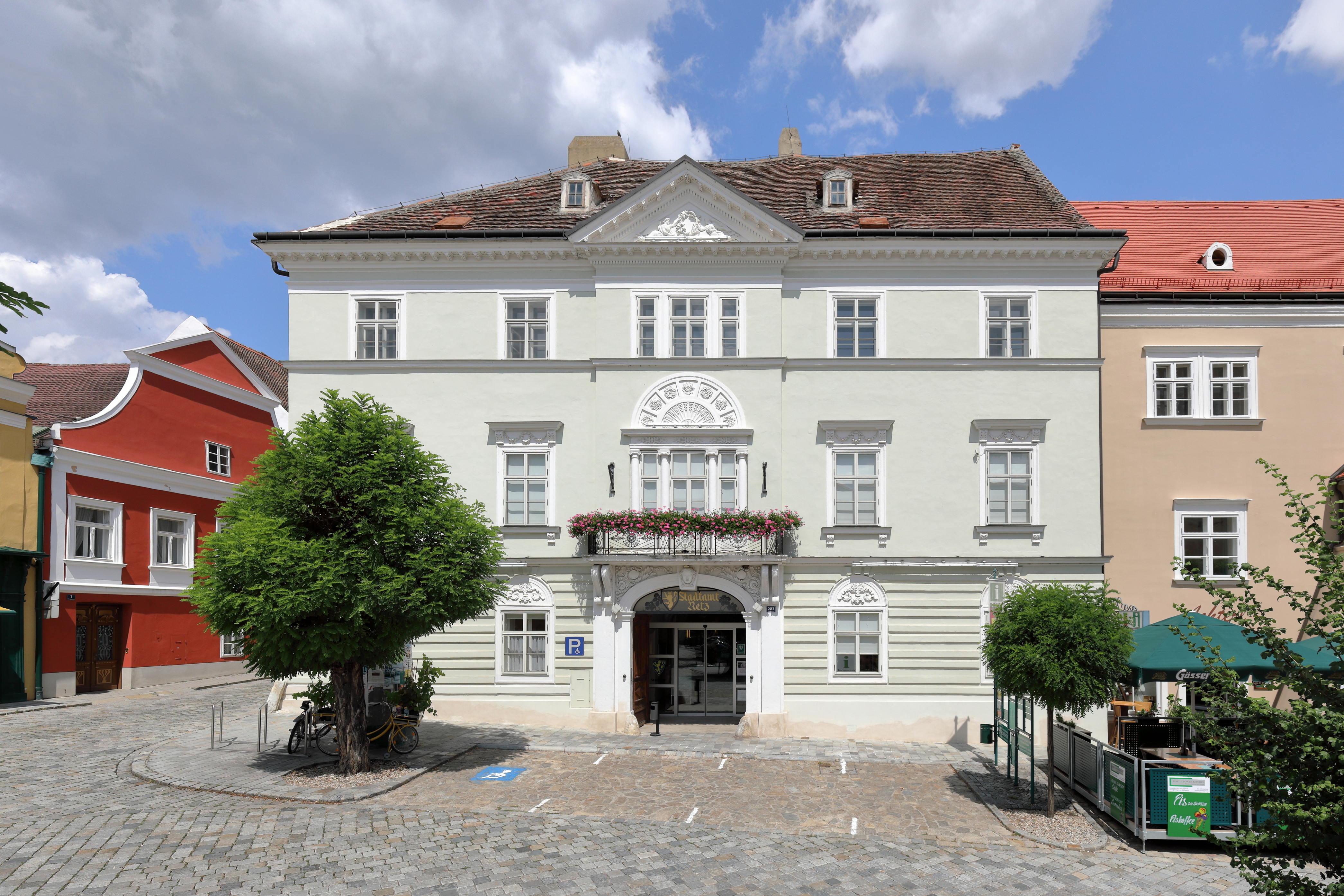 Hauptplatzseitige Ansicht des Stadtamtsgebäude in der niederösterreichischen Stadtgemeinde Retz.Das dreigeschoßige und fünfachsige Gebäude mit dreieckübergiebeltem Mittelrisalit wurde in der ersten Hälfte des 19. Jahrhunderts errichtet. Es ist biedermeierlich fassadiert und über dem Korbbogenportal im Mittelrisalit befindet sich ein Balkon auf Volutenkonsolen.